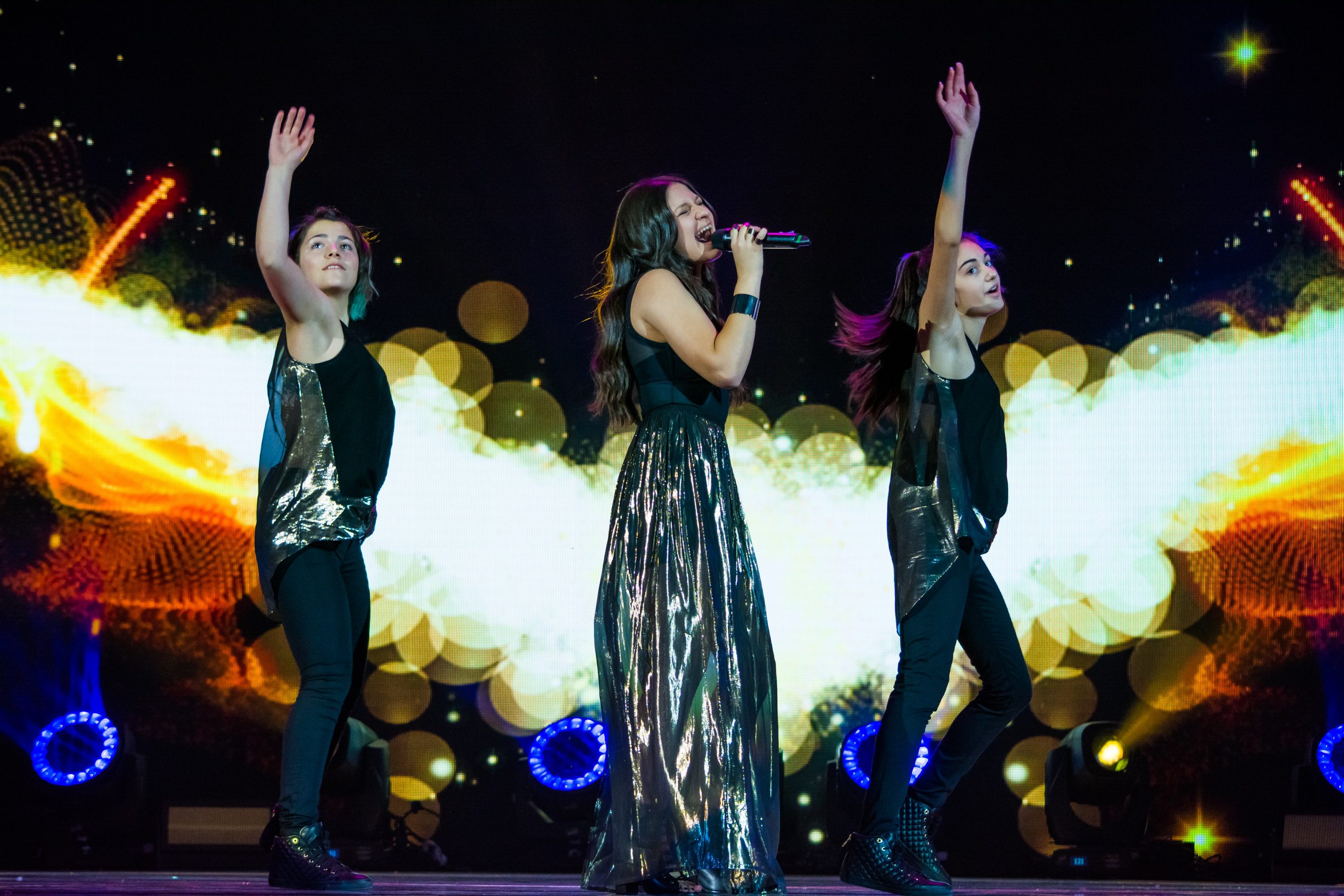 Белла Пейдж на сцене Детского Евровидения 2015 («Армеец», София) во время генеральной репетиции